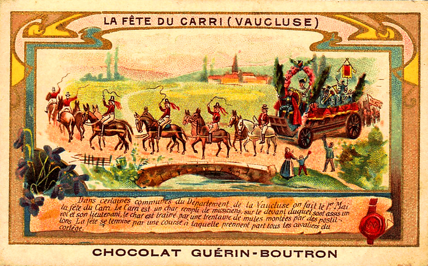 Mazan fête du Carri sur carte publicitaire